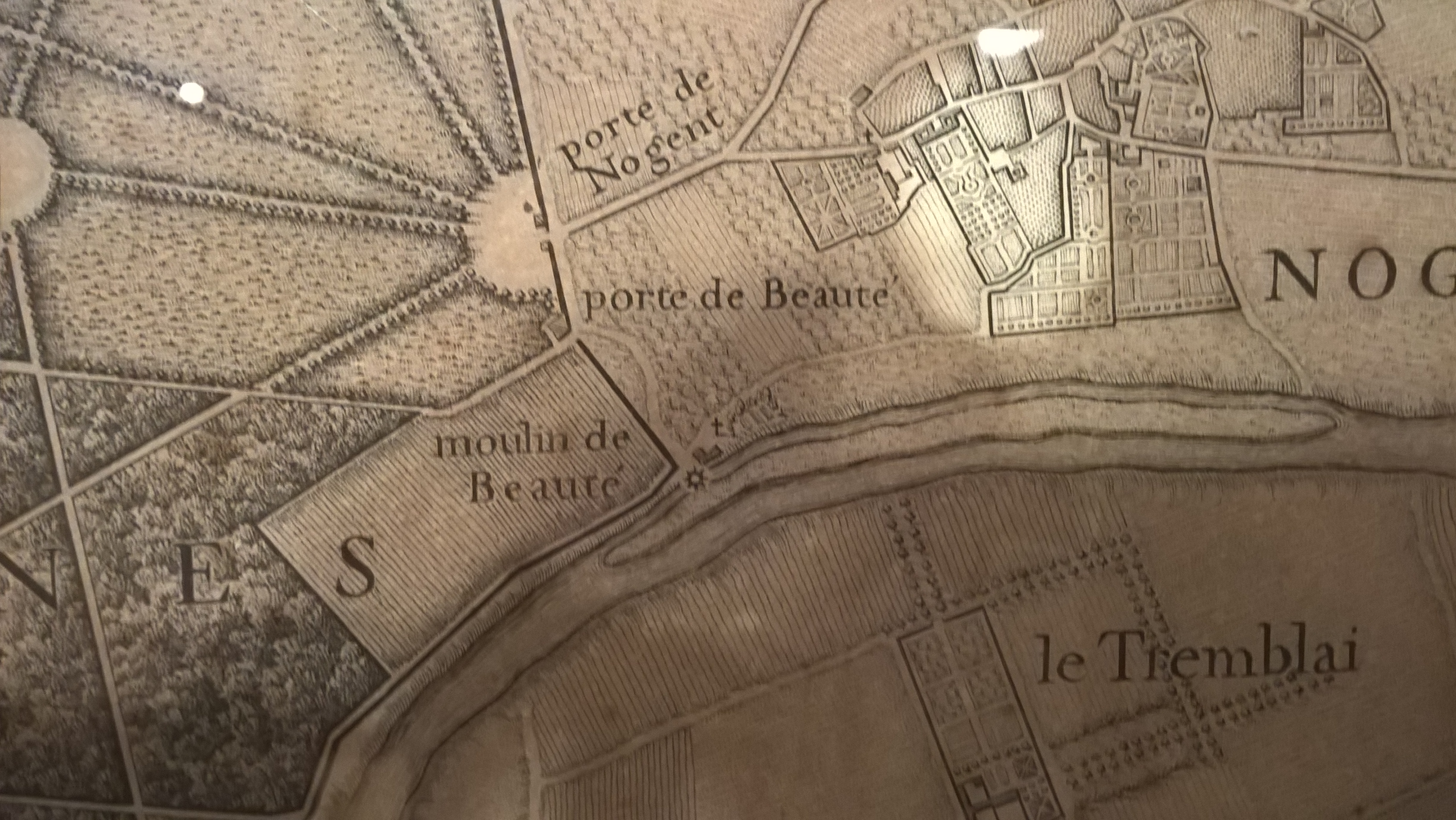 Détail d'une carte figurant la ville de Nogent-sur-Marne et de ses environs. Elle a été exécutée par l'abbé Jean Delagrive, en 1740. Cette carte est actuellement exposée au Musée de Nogent-sur-Marne.